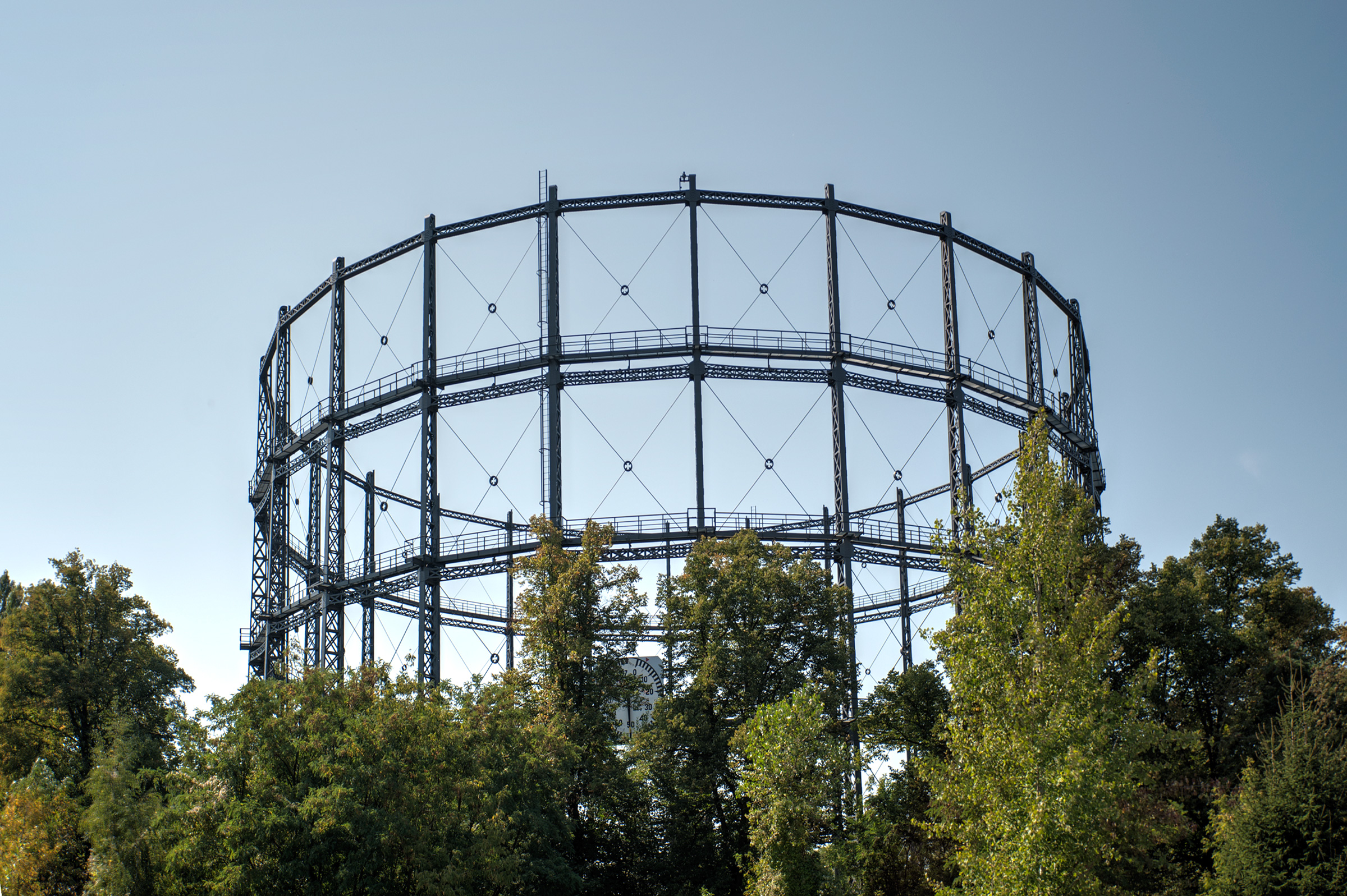 Der alte Gasometer Gaswerk Mariendorf